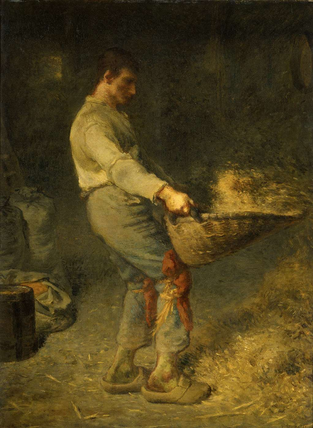 Réplique du tableau "Un vanneur". Cette copie est une variante du tableau exposé au Salon de 1848 acheté à l'époque 500 francs par Alexandre Ledru-Rollin. En 2013, l'original est exposé à la National Gallery à Londres.